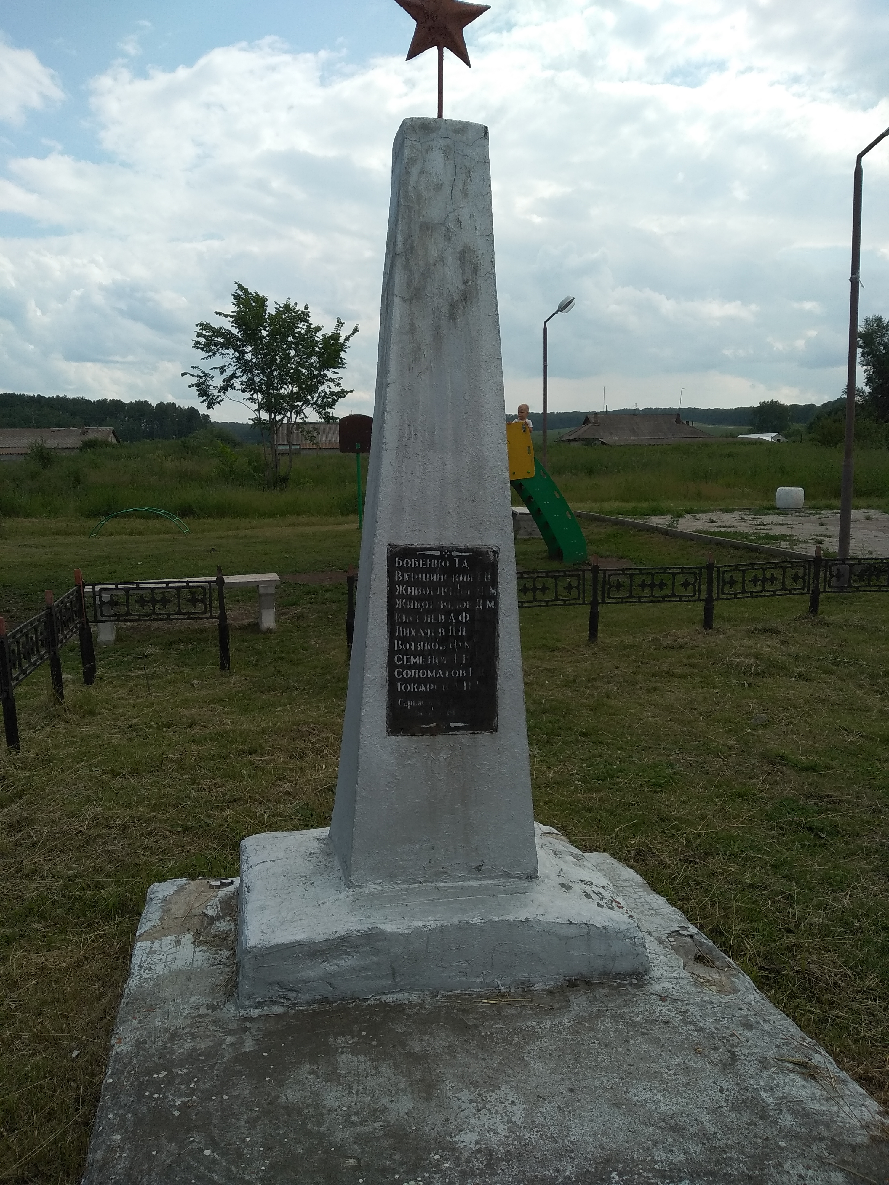 Памятник в Ильинке погибшим ильинцам в Сережском восстании 1920